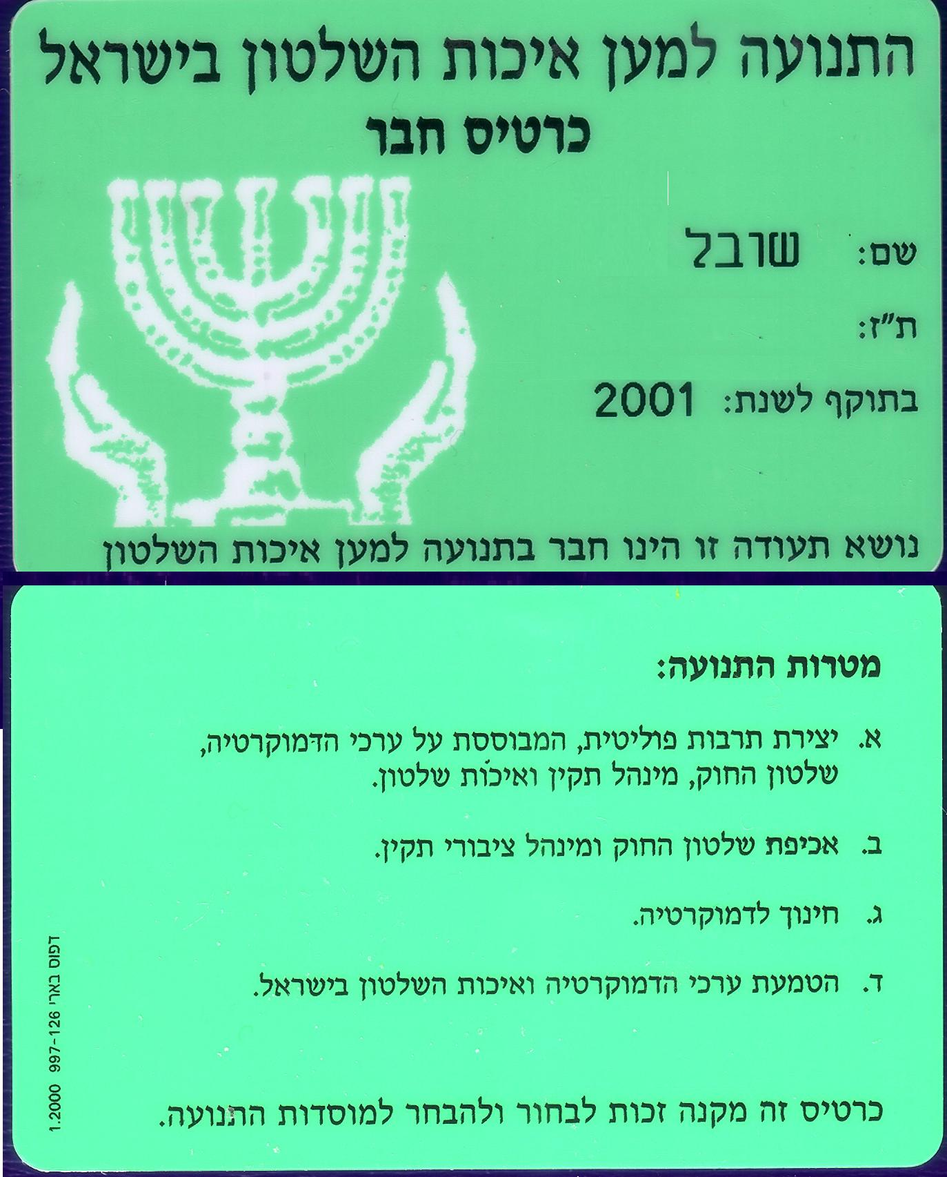 התנועה לאיכות השלטון בישראל, תעודת חבר